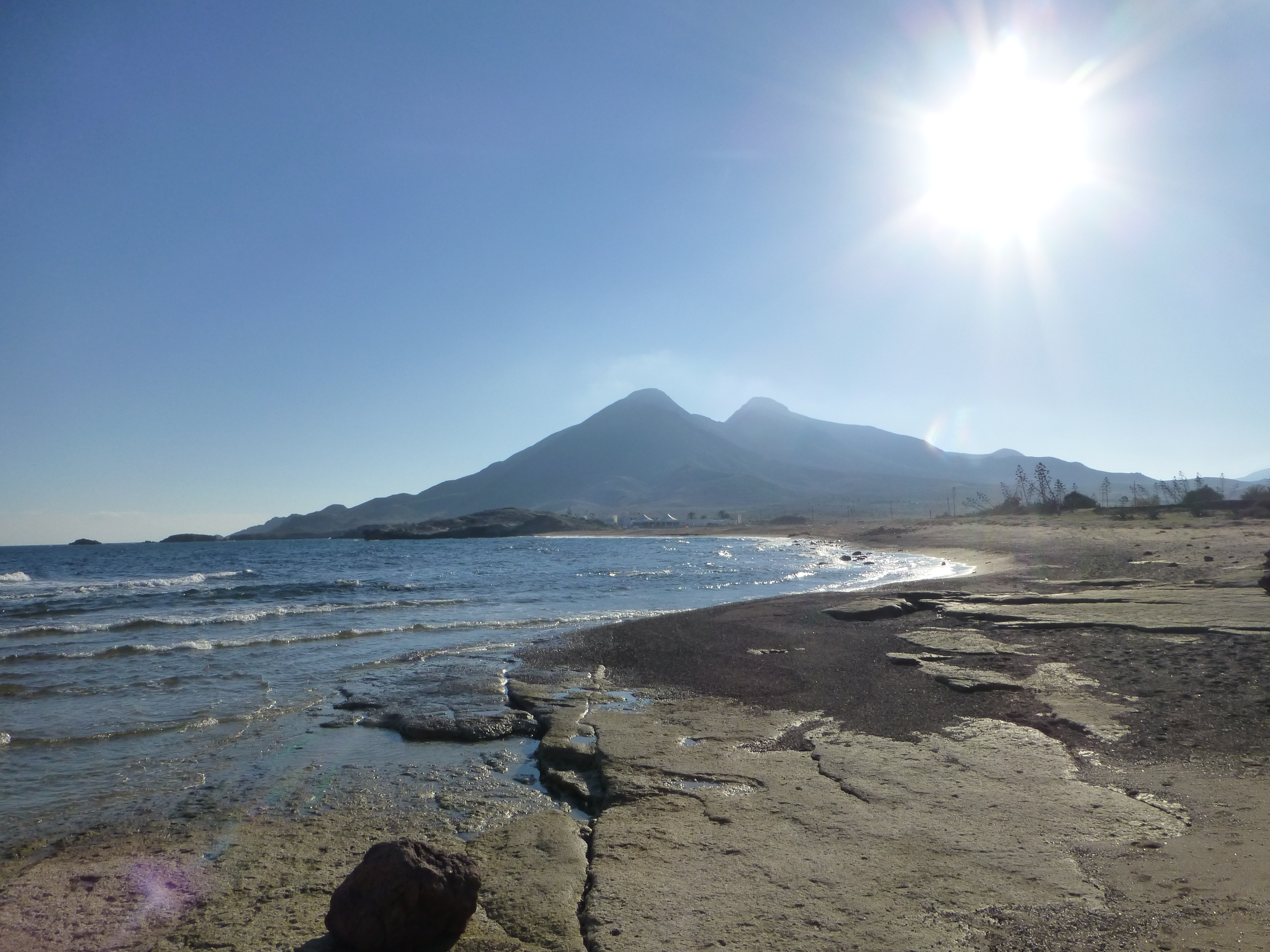 La playa del Arco vista desde su extremo norte. Al fondo, el cerro de Los Frailes. Parque natural Cabo Gata-Níjar, Níjar, Almería, Andalucía, España.